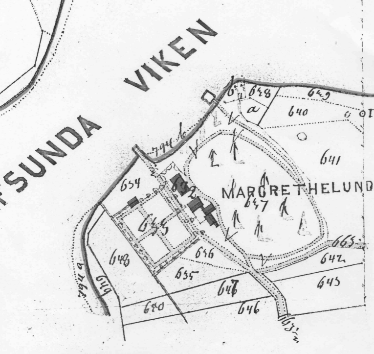 Margretelunds gård. Karta från 1868.